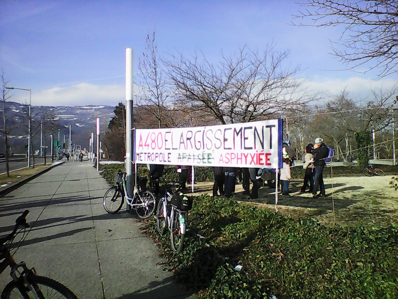 Banderole opposants A 480 parking de Catane le 26/01/2019